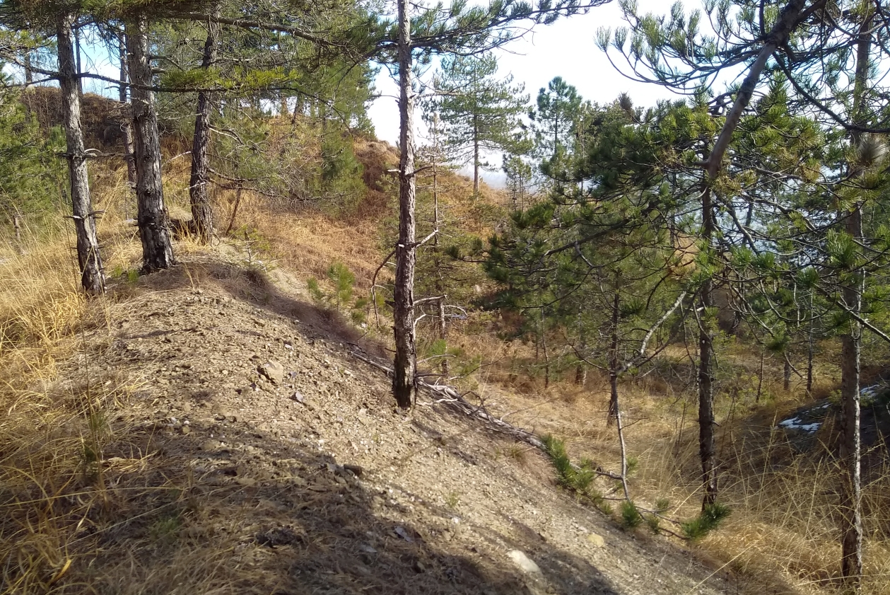 Monte Baron (Alpi Graie): una ex-cava di magnesite